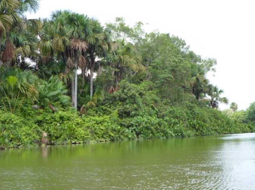 Rios de Abaetetuba